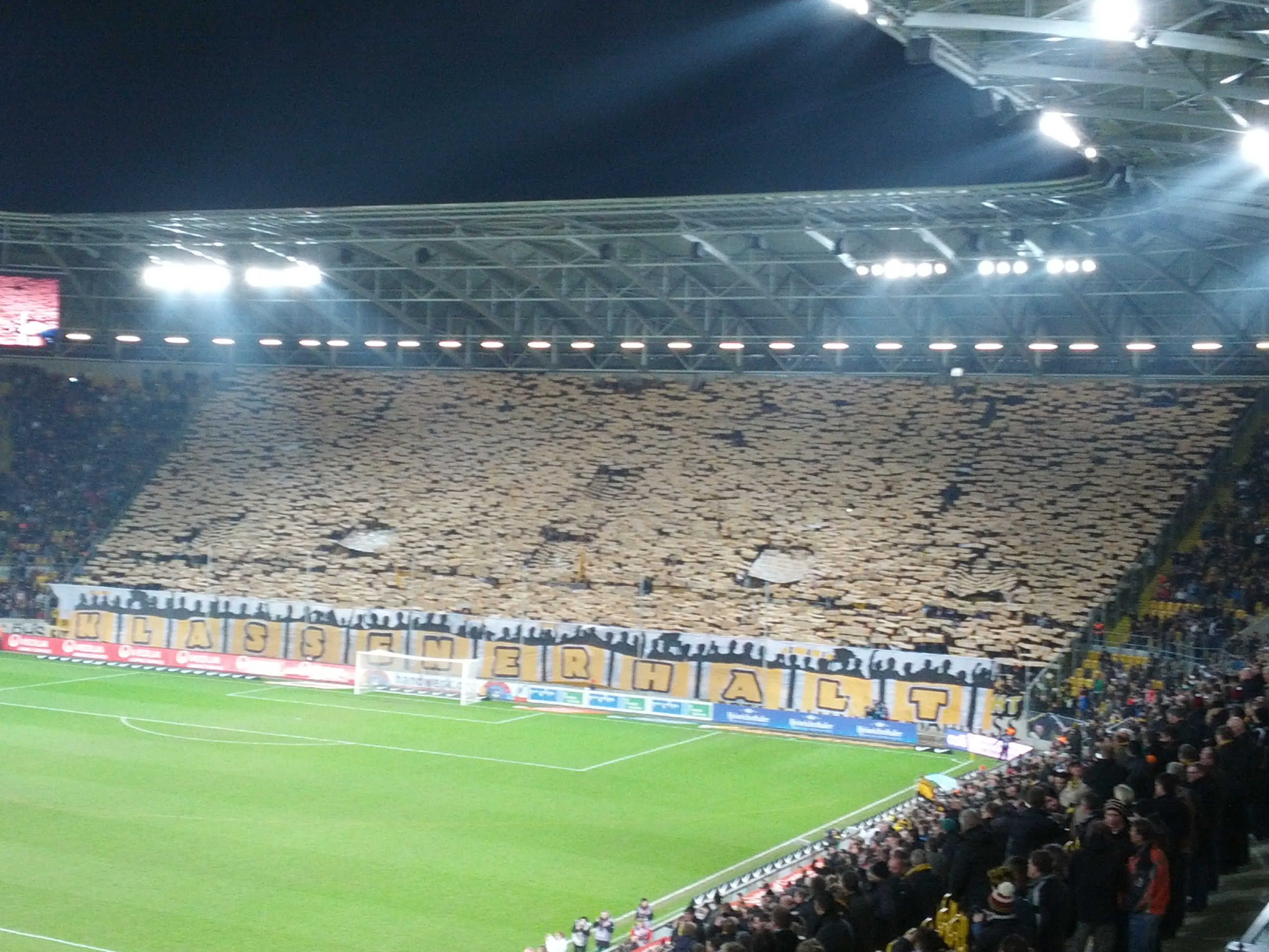 Fanchoreographie im K-Block von Dynamo Dresden gegen den MSV Duisburg 2012/2013